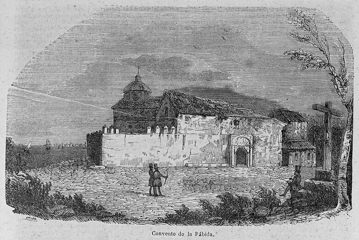 Convento de la Rábida.